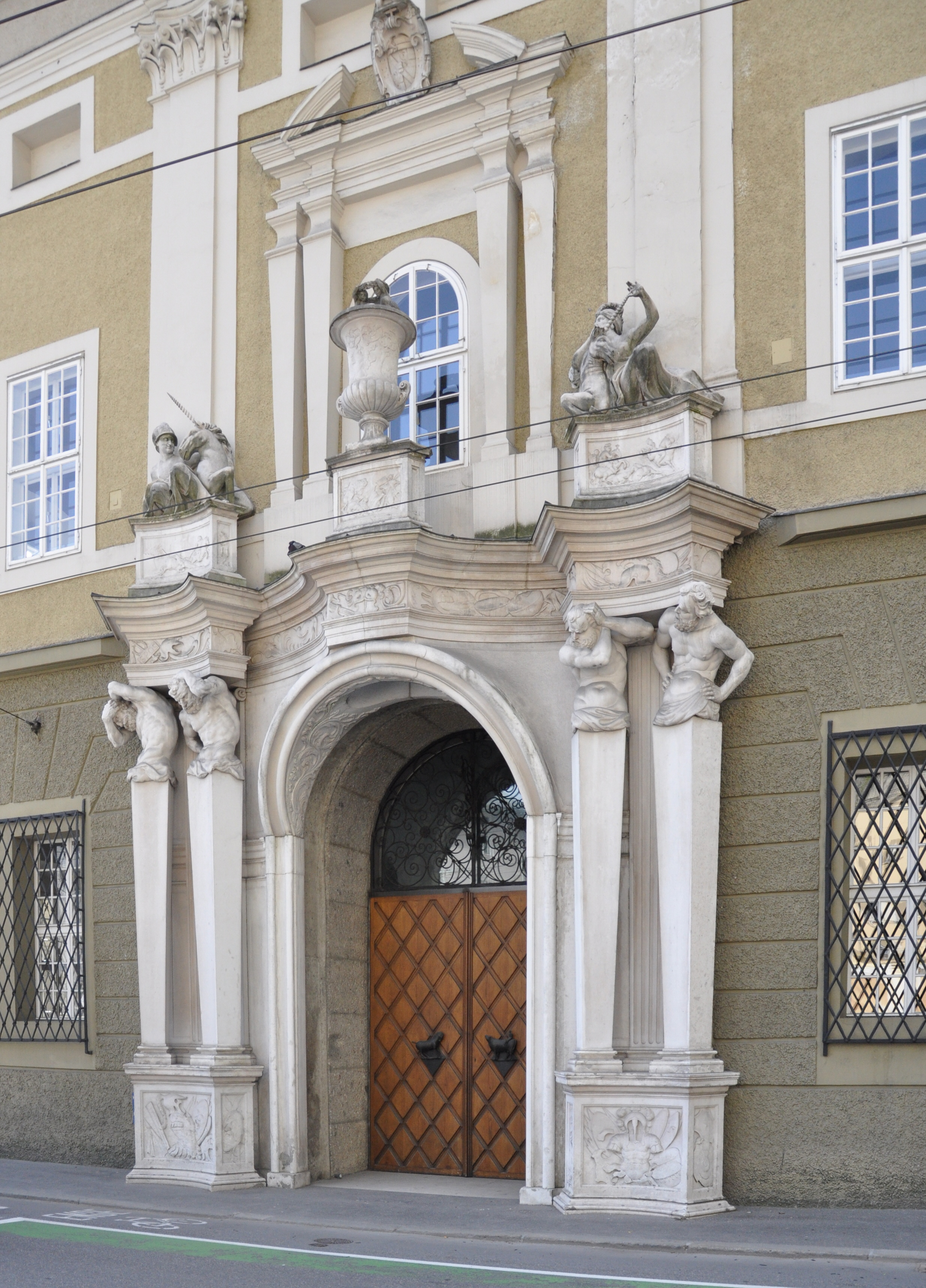 Salzburg, Großes Festspielhaus, Portal am Herbert-von-Karajan-Platz